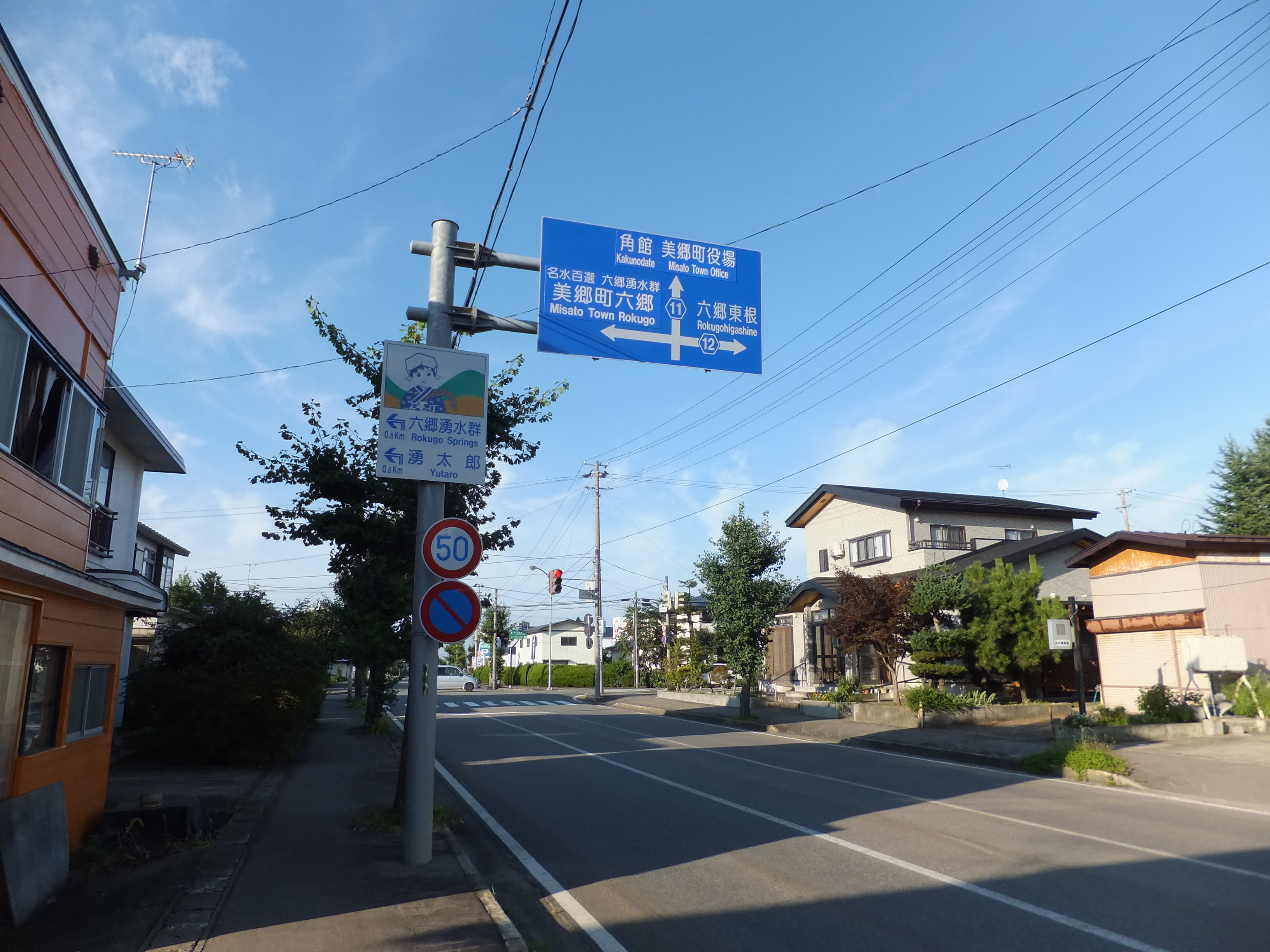 秋田県道11号線、六郷馬場交差点にて